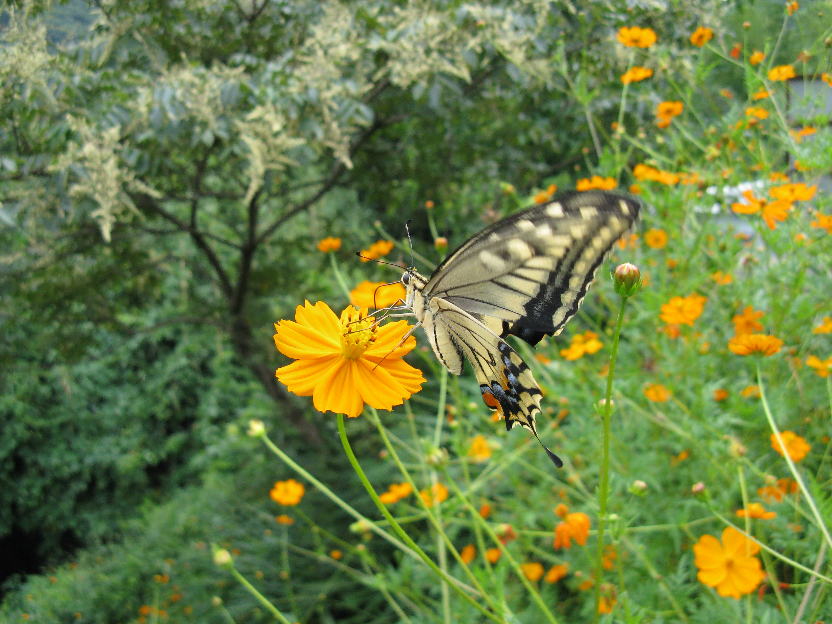 Scientific name Papilio machaon hippocrate